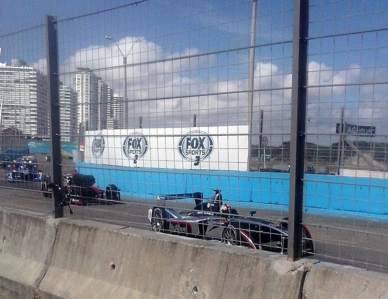 Oriol Servia en el ePrix de Punta del Este del 2014, fecha valida por la Formula E.